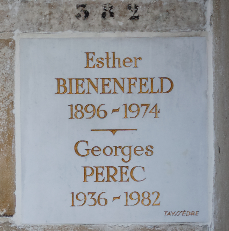 Vue d'ensemble